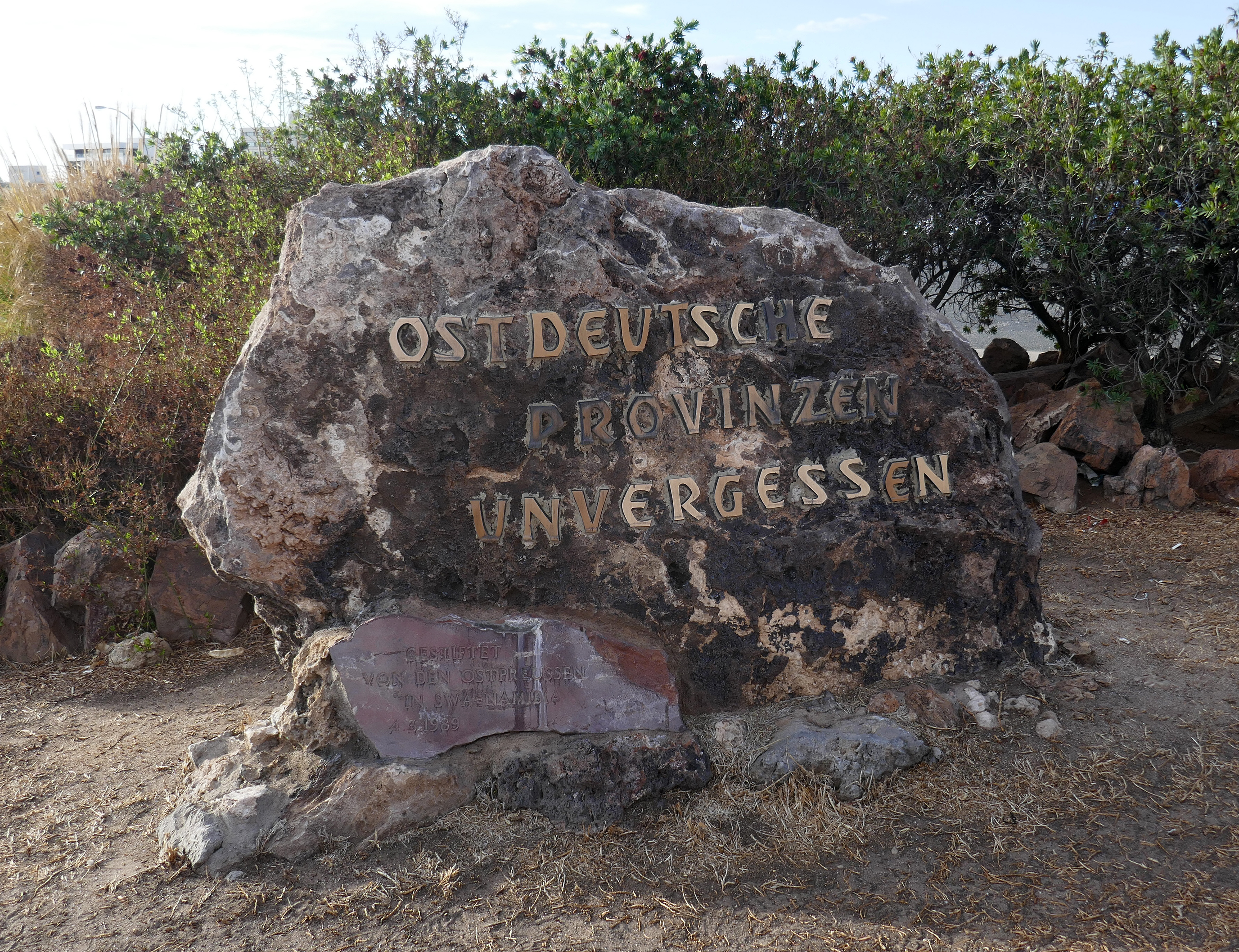 Windhoek (Namibie) : stèle près de l'église luthérienne Ostdeutsche Provinzen unvergessen.